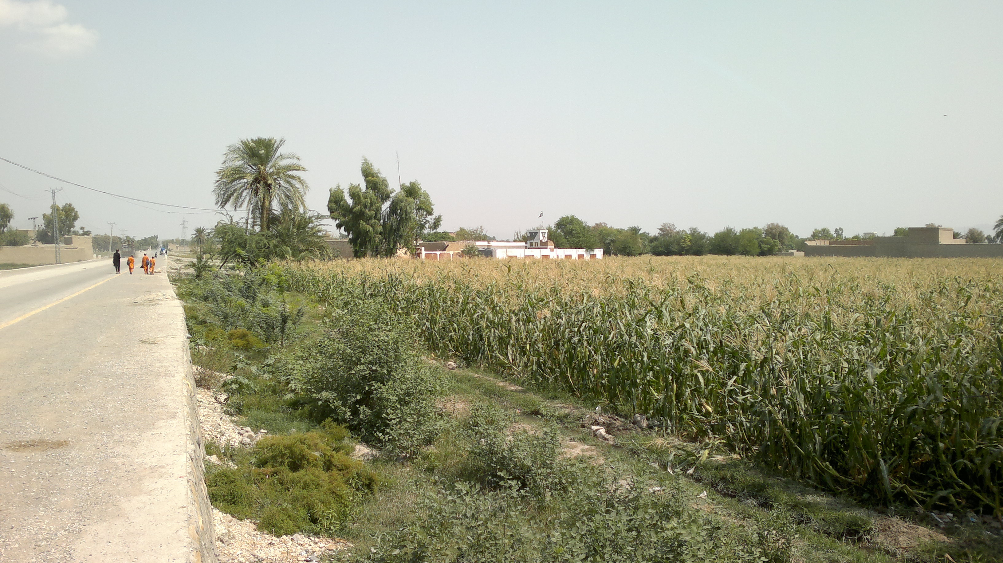 Mir Ali Patasi Adda 15